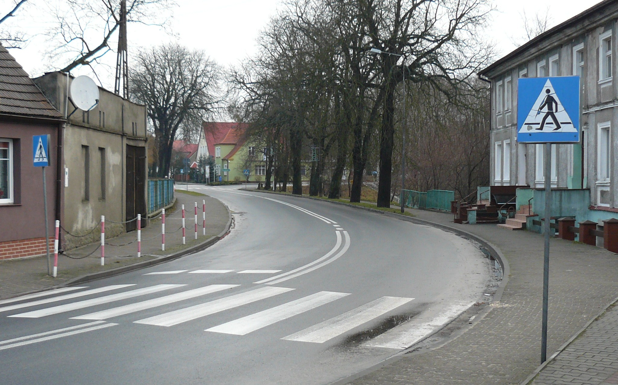 Tuczno, centrum.